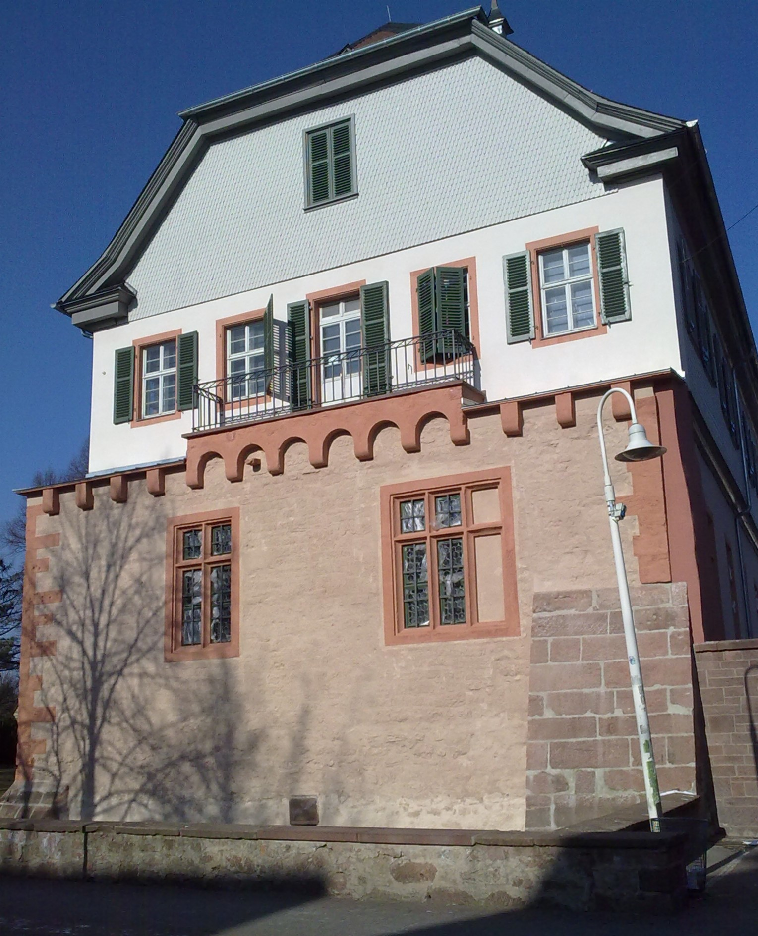 Die Südseite des Pfälzer Schlosses in Groß-Umstadt. Beginn als fuldische Wasserburg, später kurpfälzischer Besitz. Das Erdgeschoss war früher gleichzeitig Stadtmauer